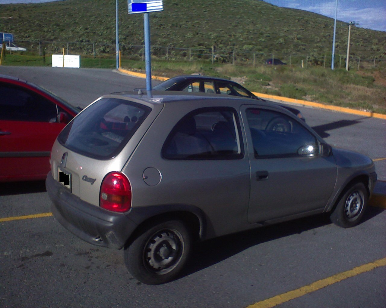 Chevrolet Chevy del 1993-2003